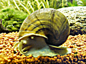 Brasilianische Apfelschnecke Von Michael Bartos erstellt, hochgeladen und unter die GFDL gestellt.